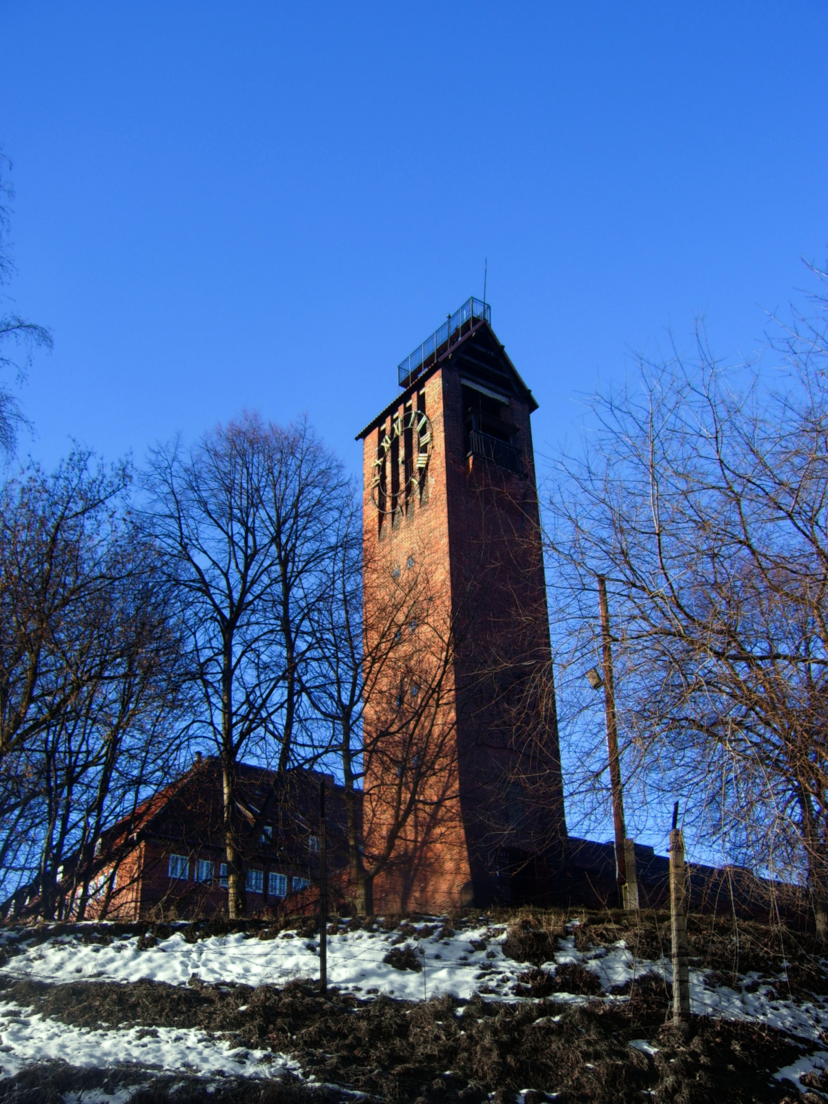 Biskupia Górka, part of Gdańsk, Poland